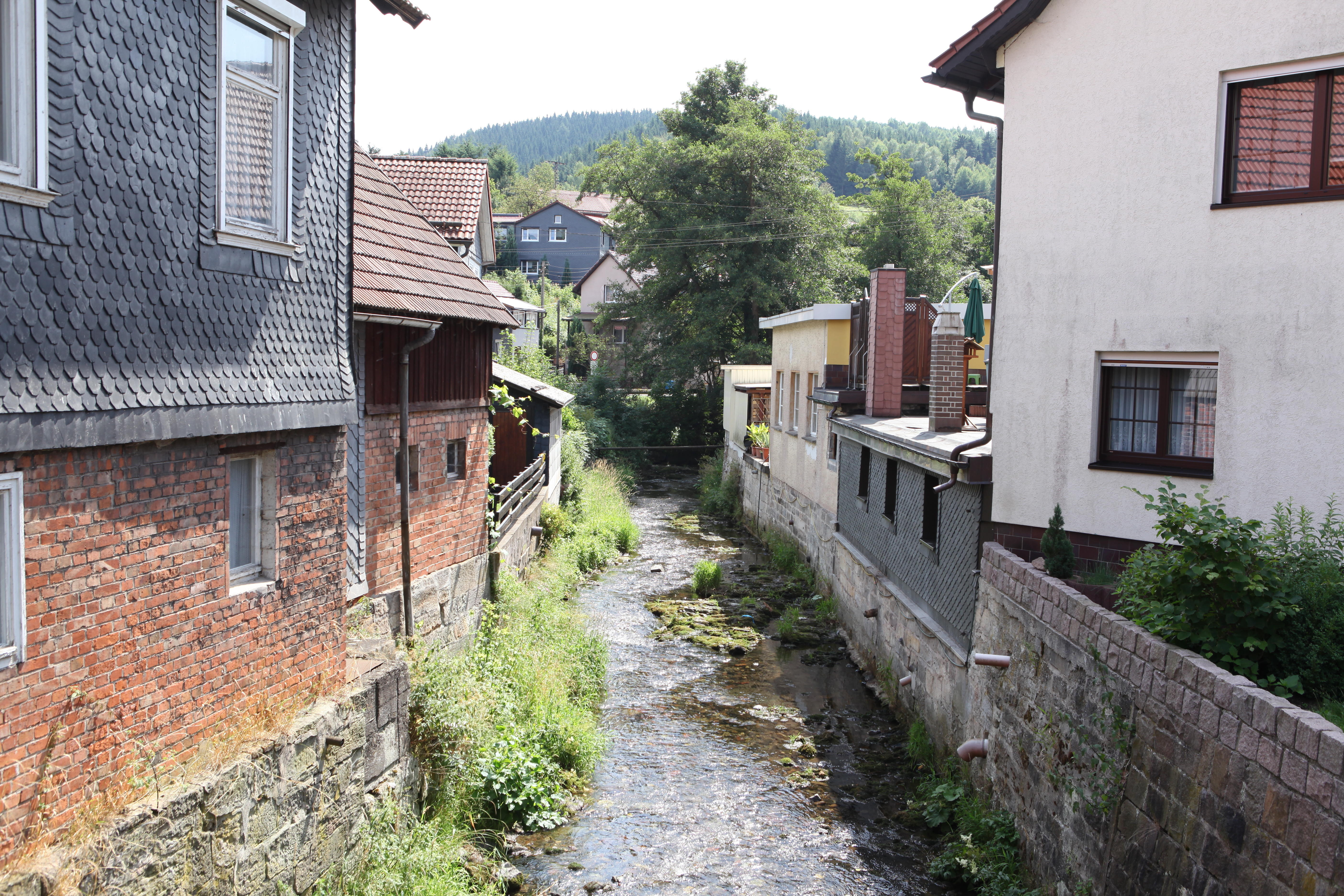 Schleuse in Schönbrunn, OT on Schleusegrund